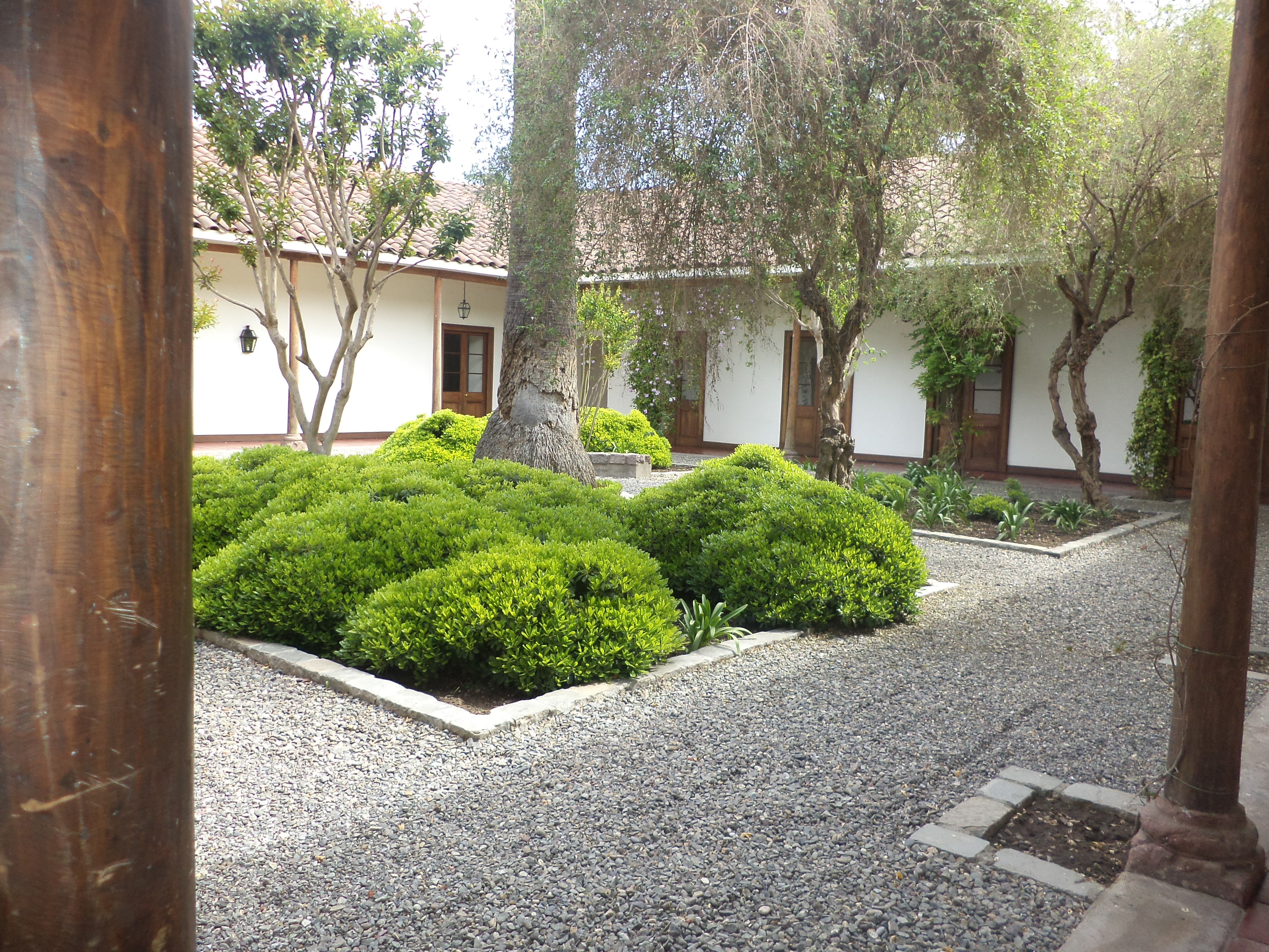 Casa del enólogo y bodegas de la viña Santa Carolina, en Santiago de Chile. Declaradas Monumento Histórico Nacional en 1973. This is a photo of a national monument in Chile: 1252